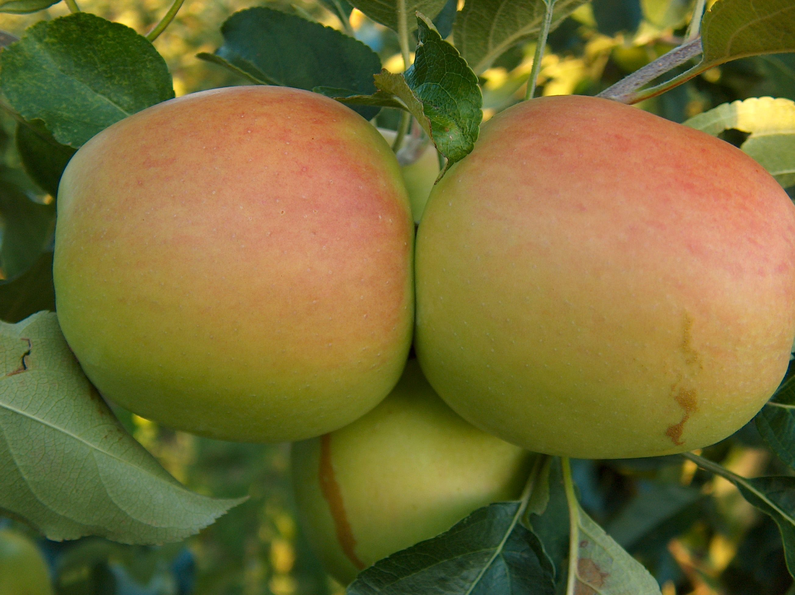 Apfelsorte Delbarestivale am Baum